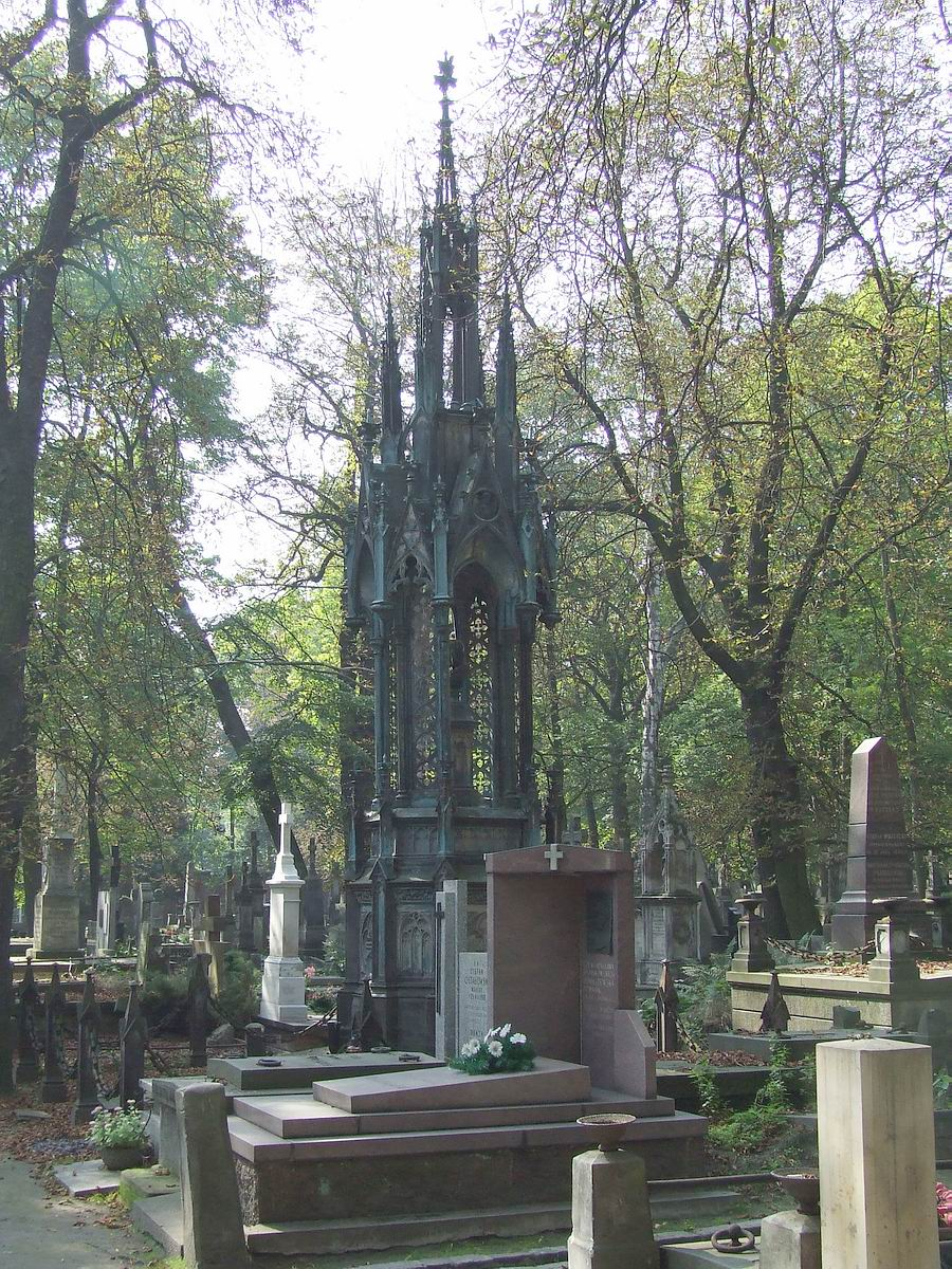 Rodzina Lilpopów (Stanisław Lilpop), grób, Stare Powązki